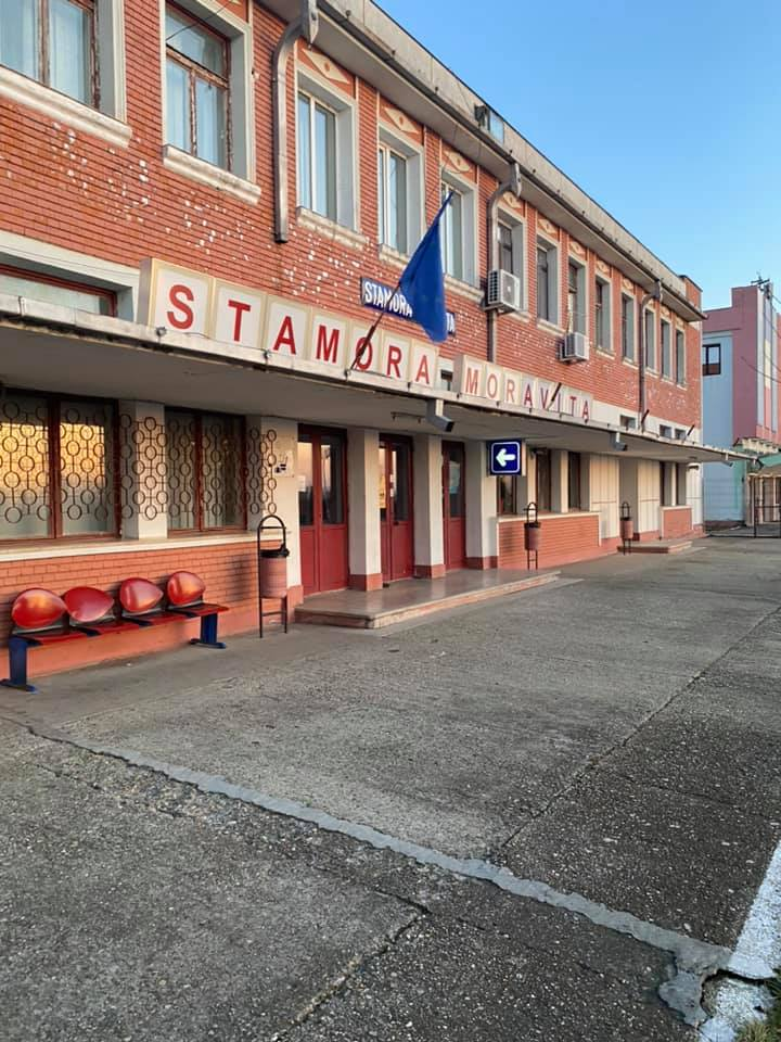 Abgebildet ist der Bahnhof Stamora Moravita